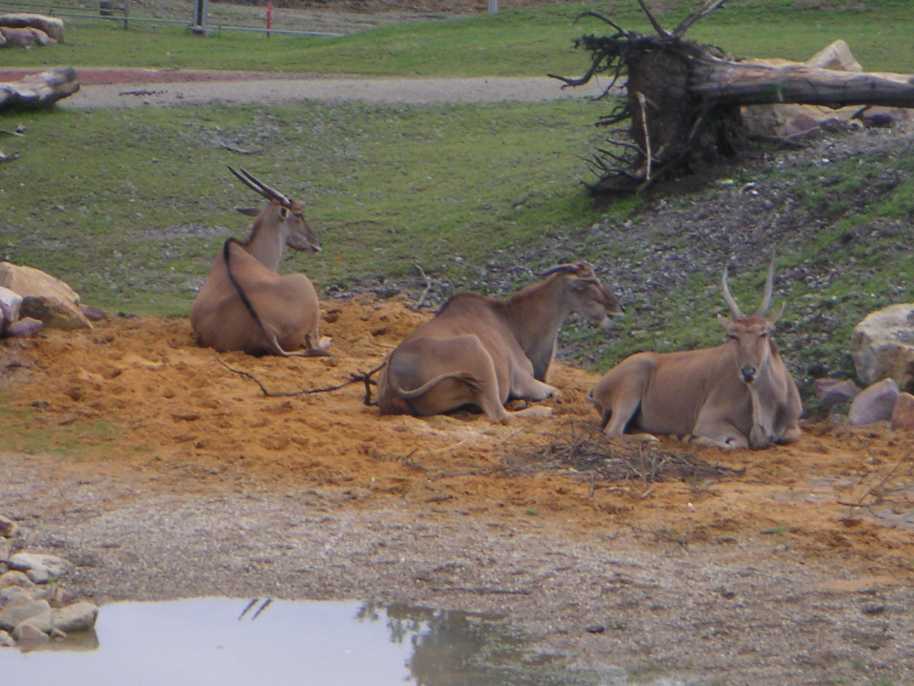 Antilopen in der Zoom Erlebniswelt Gelsenkirchen